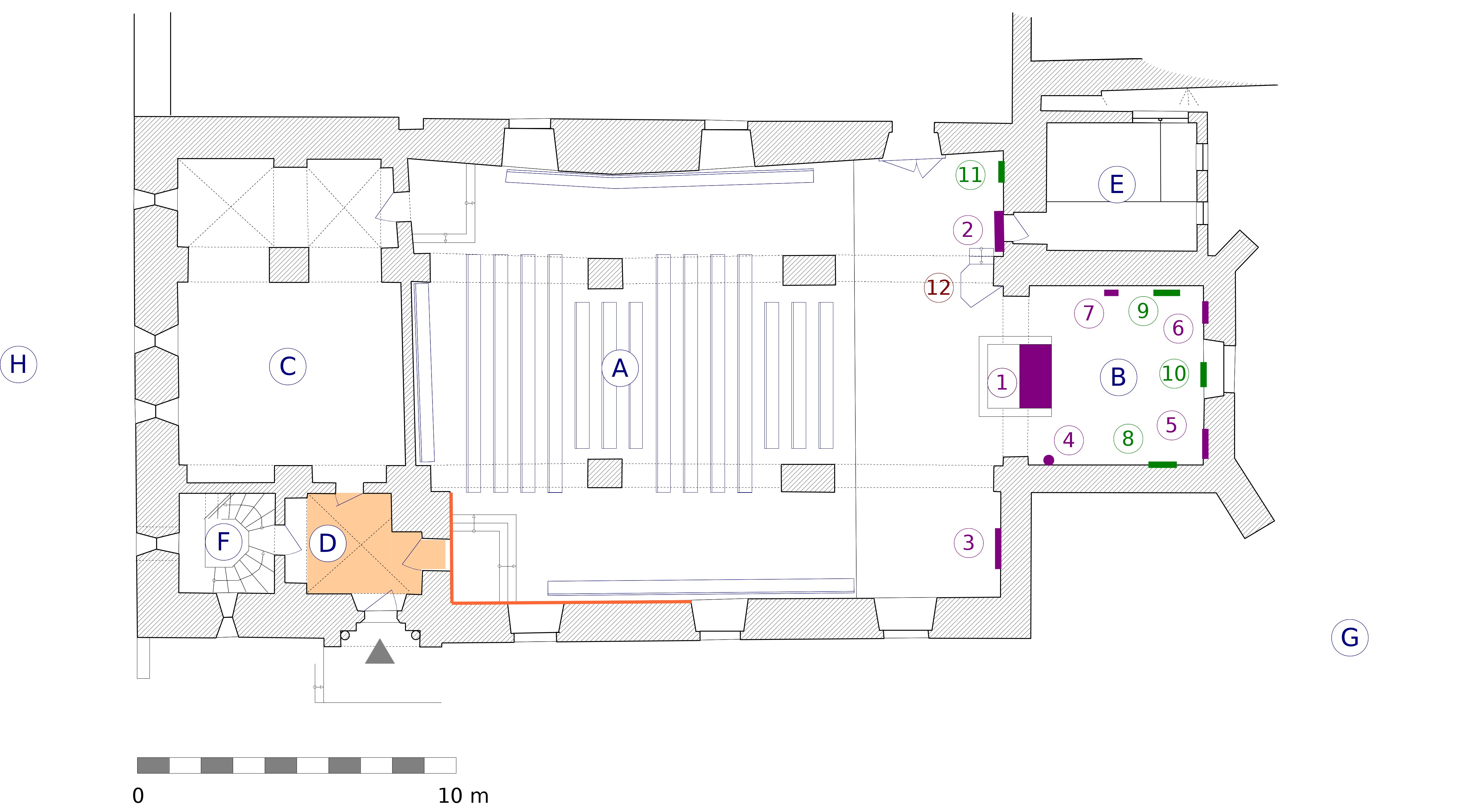 Grundriss der ev.-luth. Kirche St. Christophorus in Reinhausen, Gemeinde Gleichen in Niedersachsen, Deutschland. Grundriss selbst gezeichnet auf Grundlage des Aufmaßes von Ulfrid Müller (Müller 1970). Die Schnittebene des Grundrisses verspringt mehrfach, um eine gleichzeitige Darstellung der höher gelegenen Fenster und der tiefer gelegenen Türen zu ermöglichen. Orange: Fresken an Wand und Gewölbe Raumgliederung: A Kirchenschiff B Chorraum C Gemeindesaal / Winterkirche mit Küche D Eingangshalle E Sakristei / Heizung F Treppenaufgang zu der Orgel, der Mauritiuskapelle und den Türmen, darunter WC (Außentür unter dem Westfenster) G Friedhof H Parkplatz Ausstattung: 1 Hauptaltar, spätgotisch (1498) 2 Jodokusschrein, spätgotisch (1507) 3 Triumphkreuz, spätgotisch 4 Steinplastik des Christophorus, romanisch 5 Tympanon, romanisch 6 Tabernakelaufsatz, gotisch 7 Kreuzweg-Relief, gotisch 8 Grabplatte Christoph Wolff von Gudenberg, Gusseisen, 1569 9 Grabplatte Melchior von Uslar, Gusseisen, 1574 10 Epitaph Maria Magdalena von Busch, Holz, 1735 11 Grabplatte Veit Andreas Hornhardt, Stein, 1706 12 Kanzel (20. Jahrhundert)